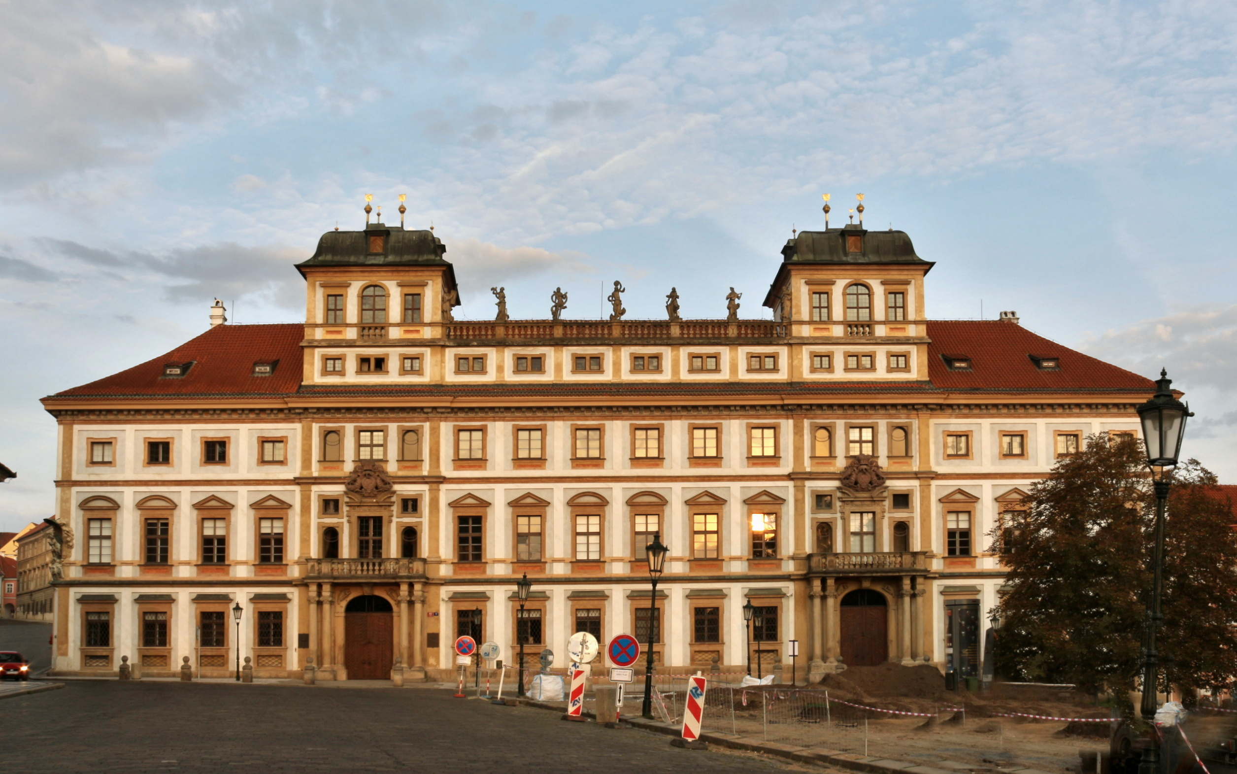 Toskánský palác v Praze na Hradčanech